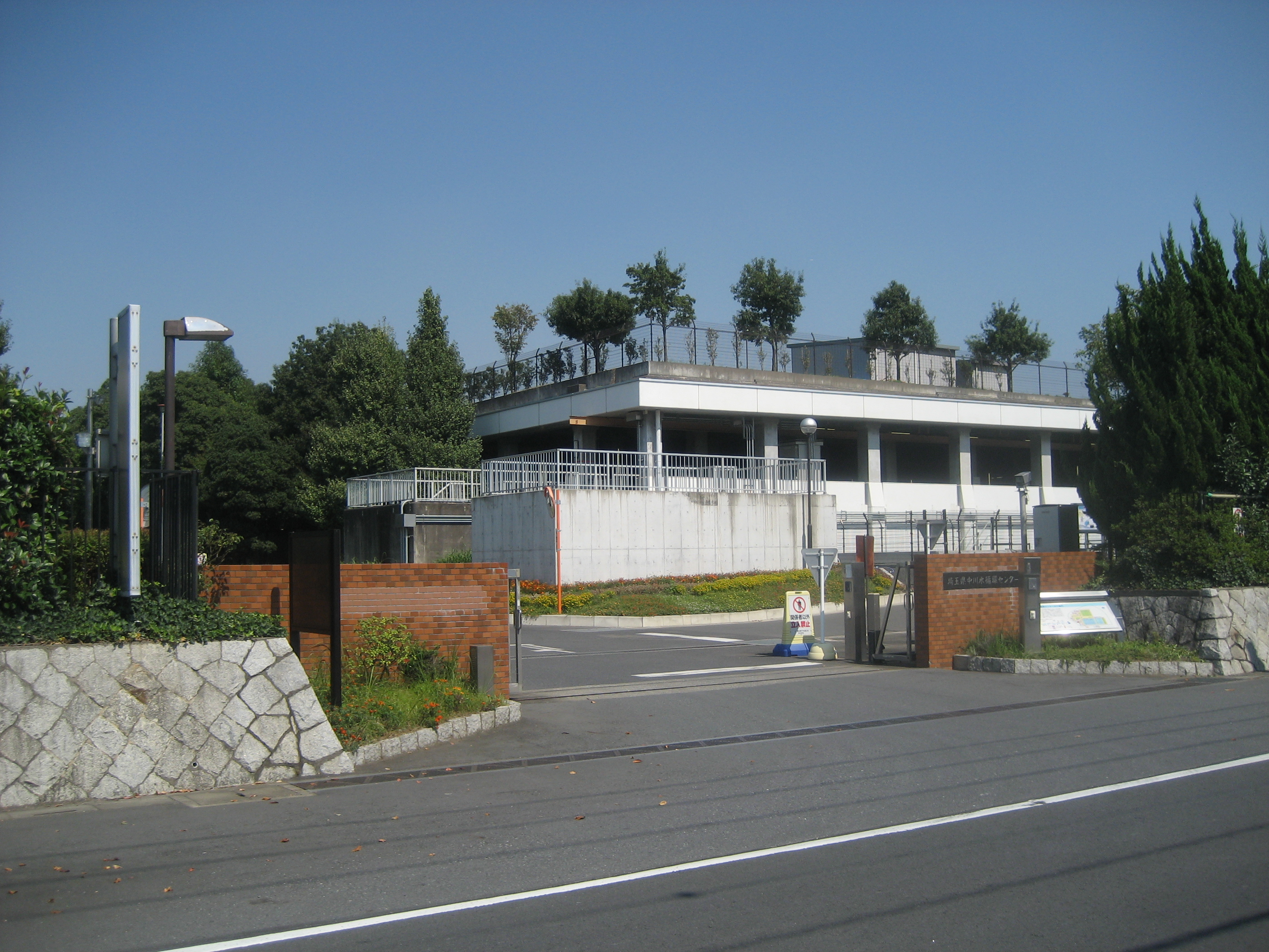 埼玉県三郷市に所在する埼玉県中川水循環センター（下水処理場）(水処理施設が写る方向を撮影）